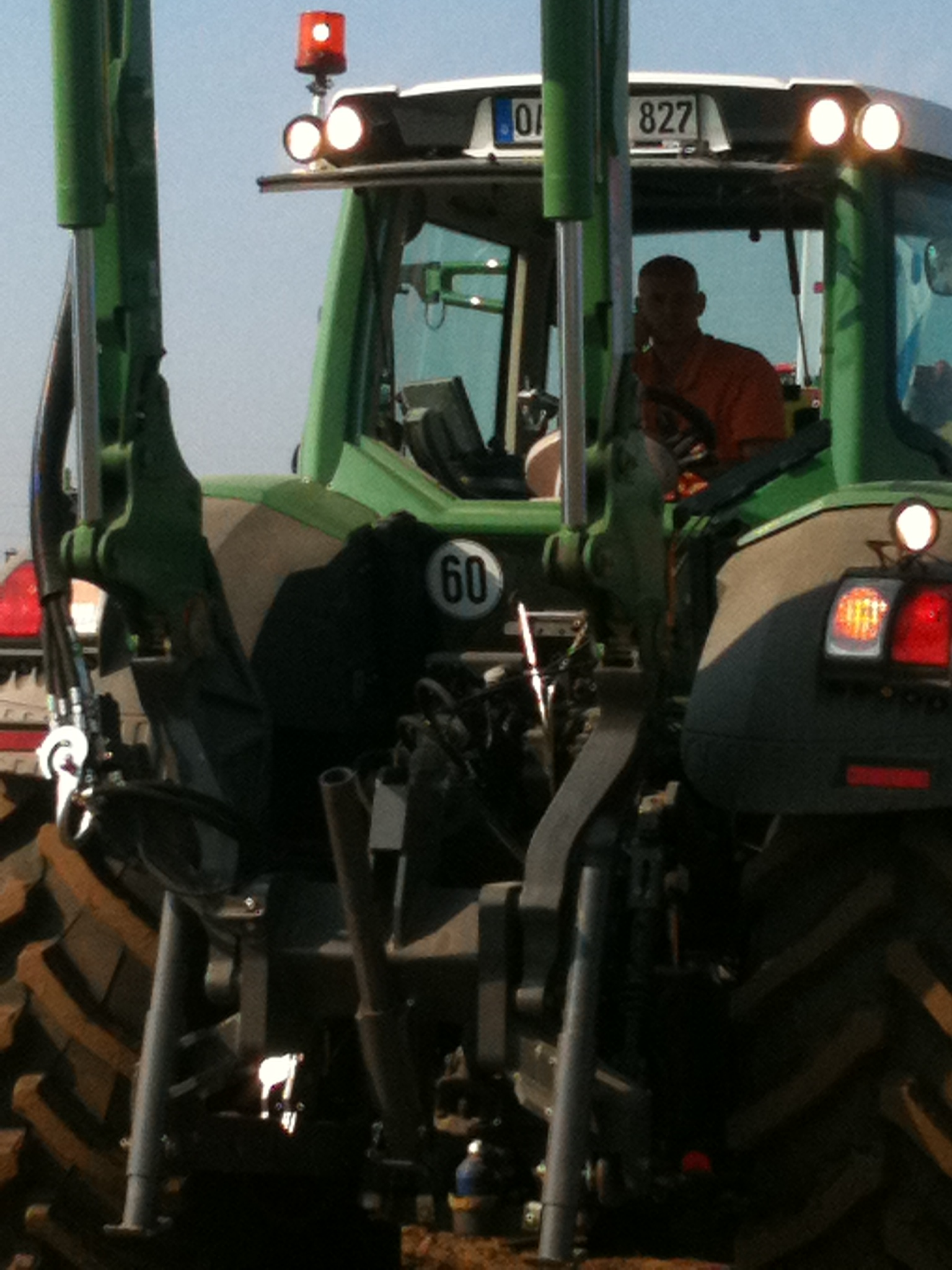 Rückfahreinrichtung mit Hecklader an Fendt Vario